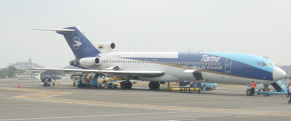 TAME in Guayaquil